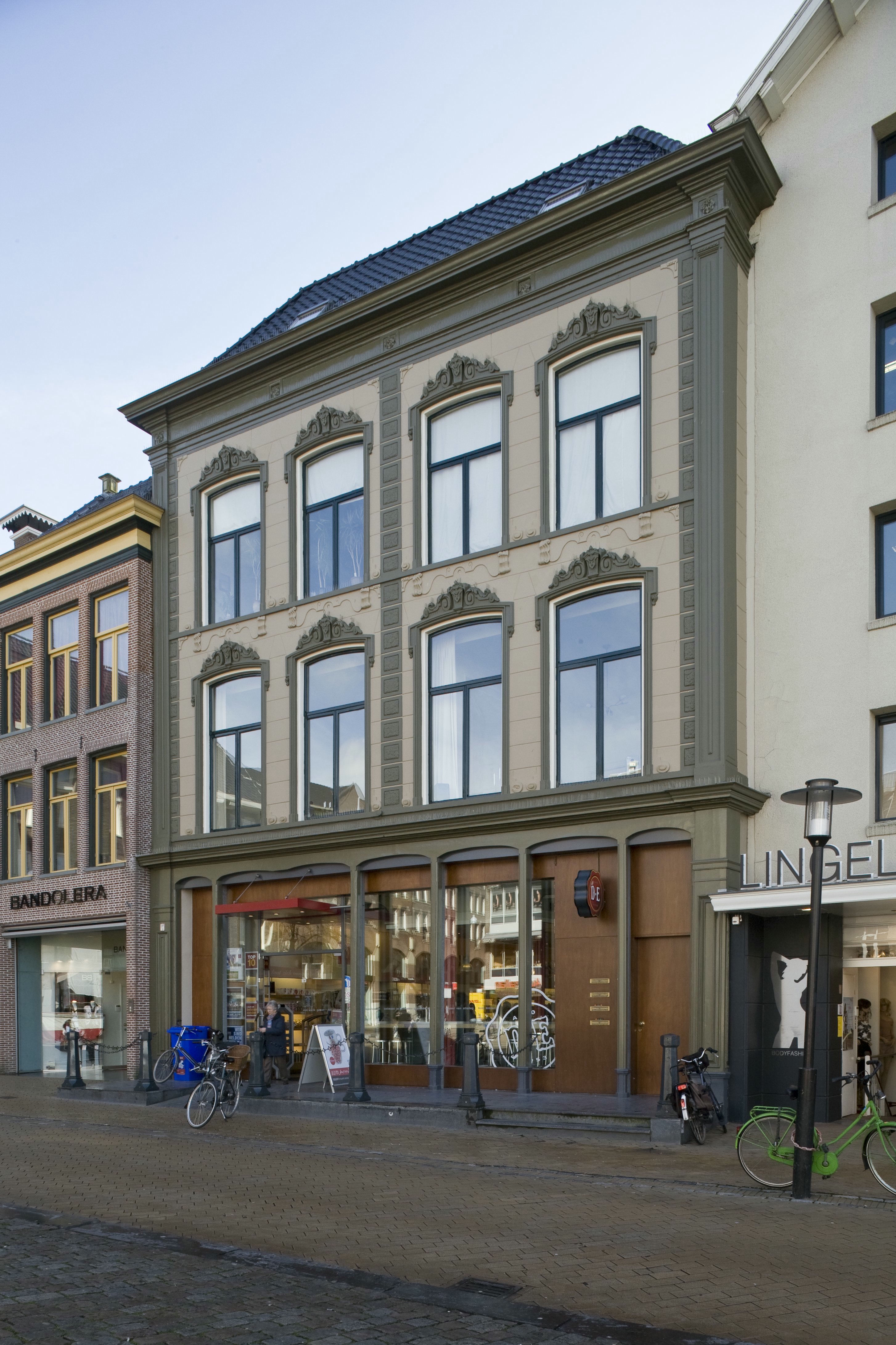 Winkelpui: Overzicht van de voorgevel